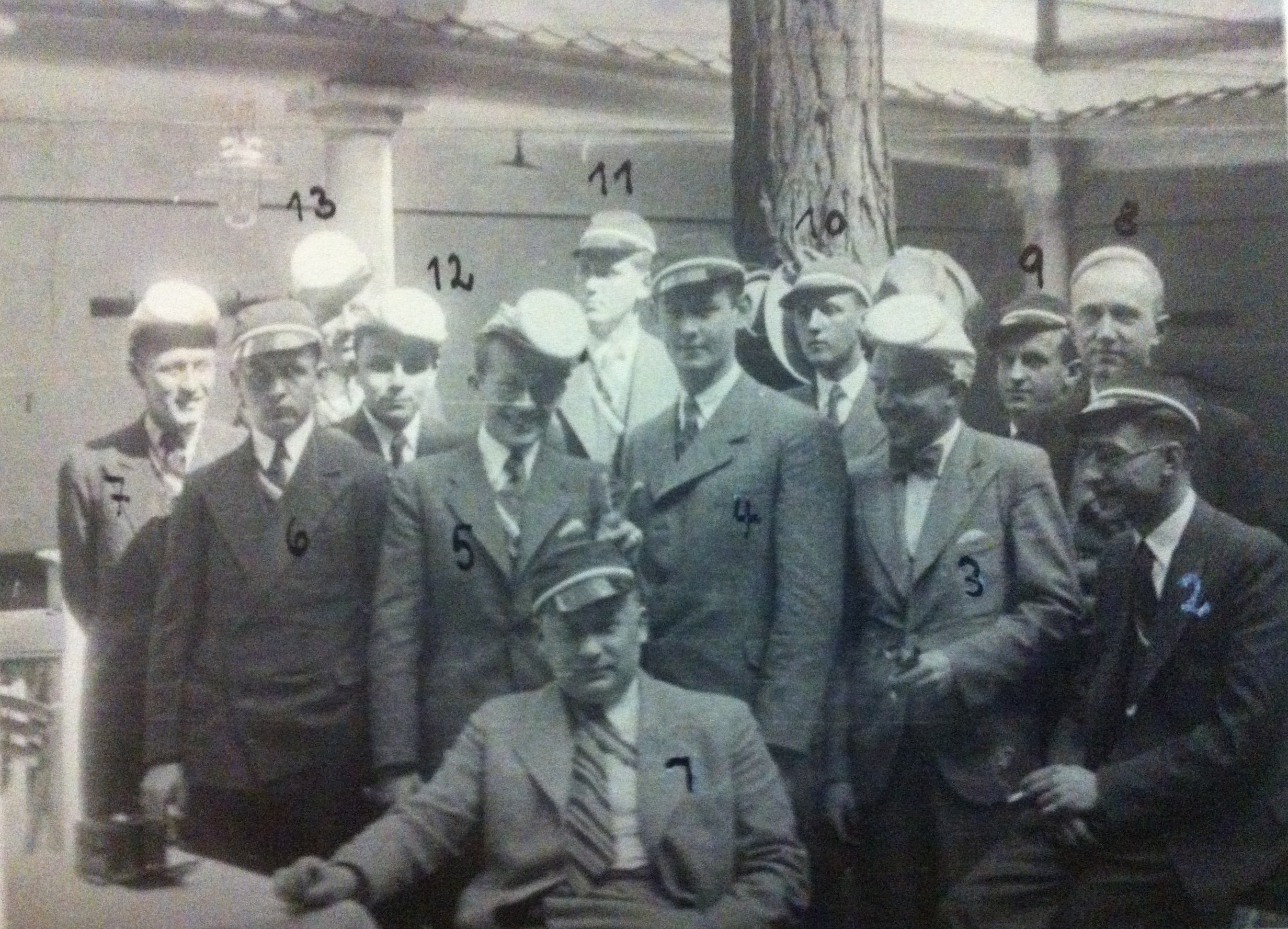 Frühschoppen des Prager Senioren-Convents 1934 im Corpslokal Zum Goldenen Kreuzl. Personen: 1. Sladek, 2. Feldmann fr. Moenaniae, 4. Forner, 6. Ostarek, 9. Thumser, 10. Richter, 11. Keller fr. Bavariae Würzburg